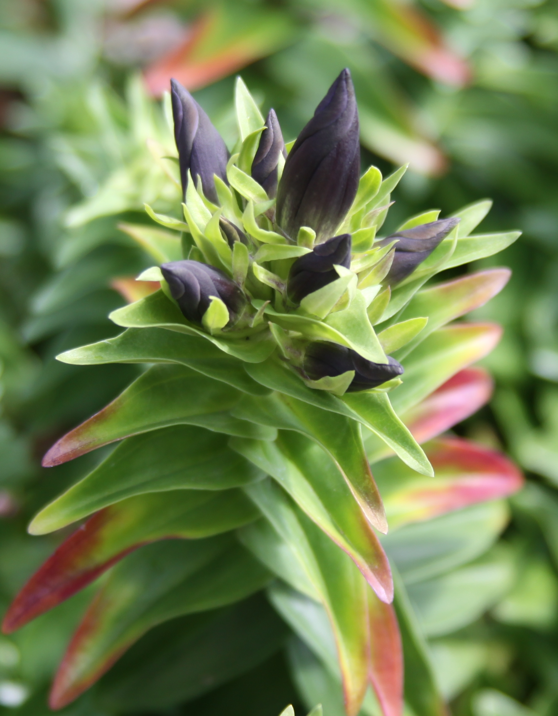 Copenhagen Botanical Garden